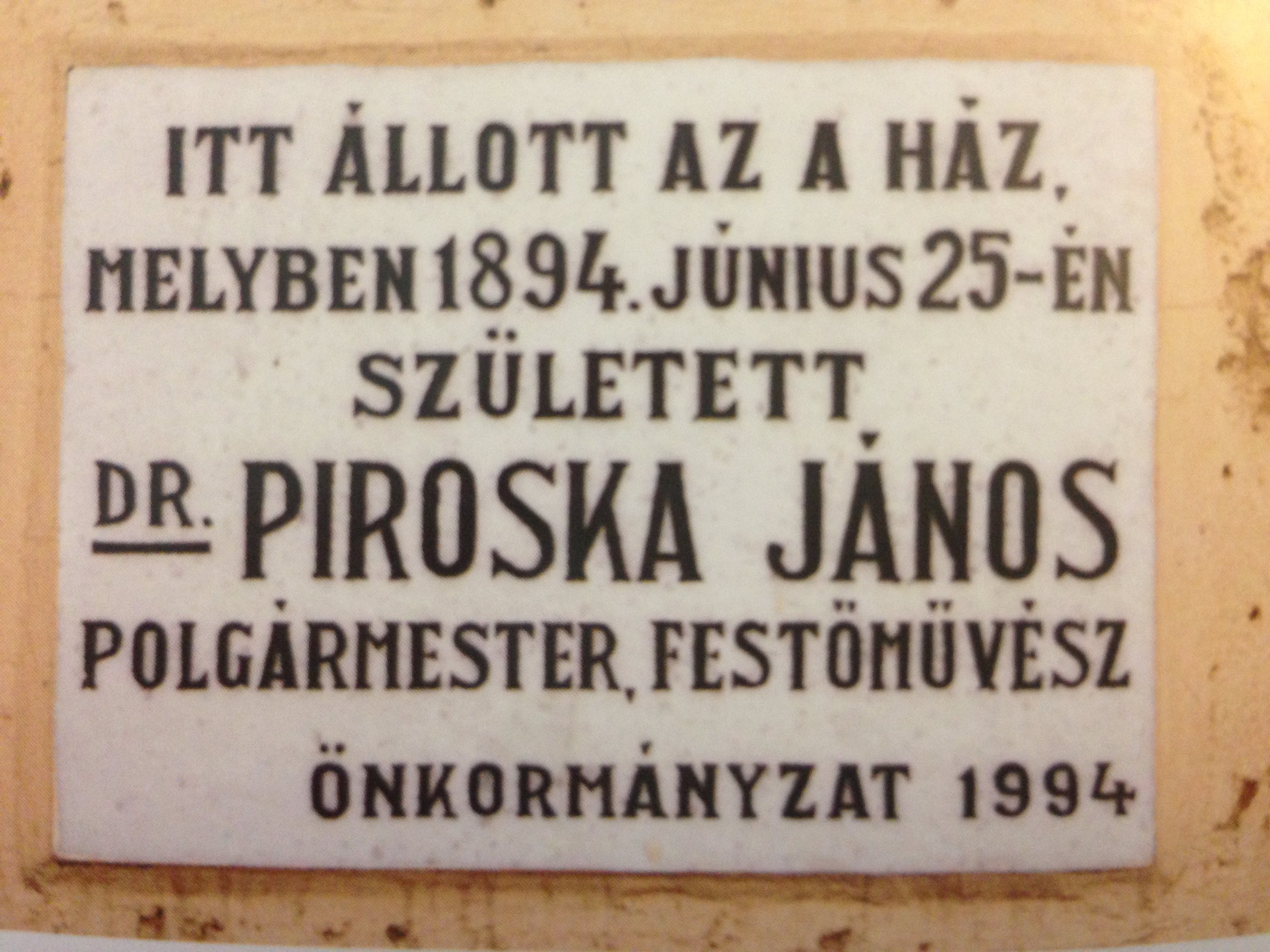 emléktábla, Dr. Piroska János szülőházánál